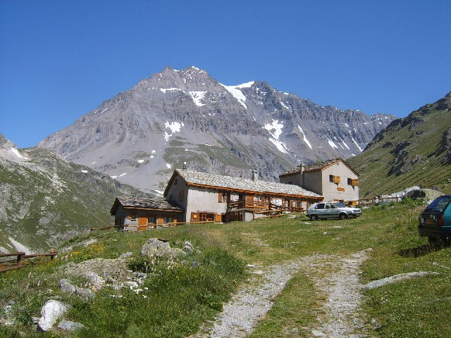 Refuge Entre-Deux-Eaux, dans la vallée de la Leisse, Parc national de la Vanoise. Derrière, la Grande Casse, 3.855 mètres (pointe Mathews, 3.783 mètres).